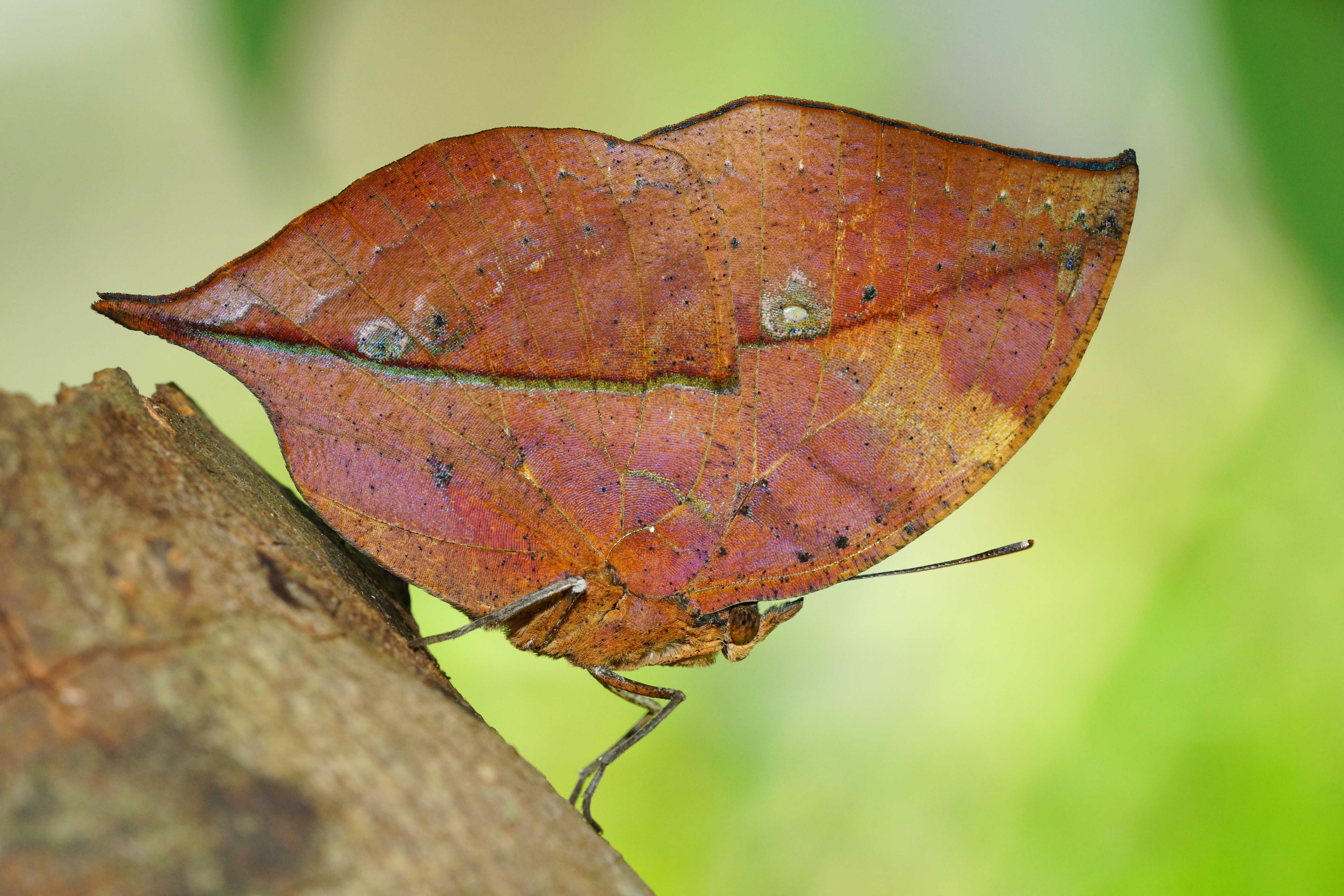 枯葉蝶 Kallima inachus formosana